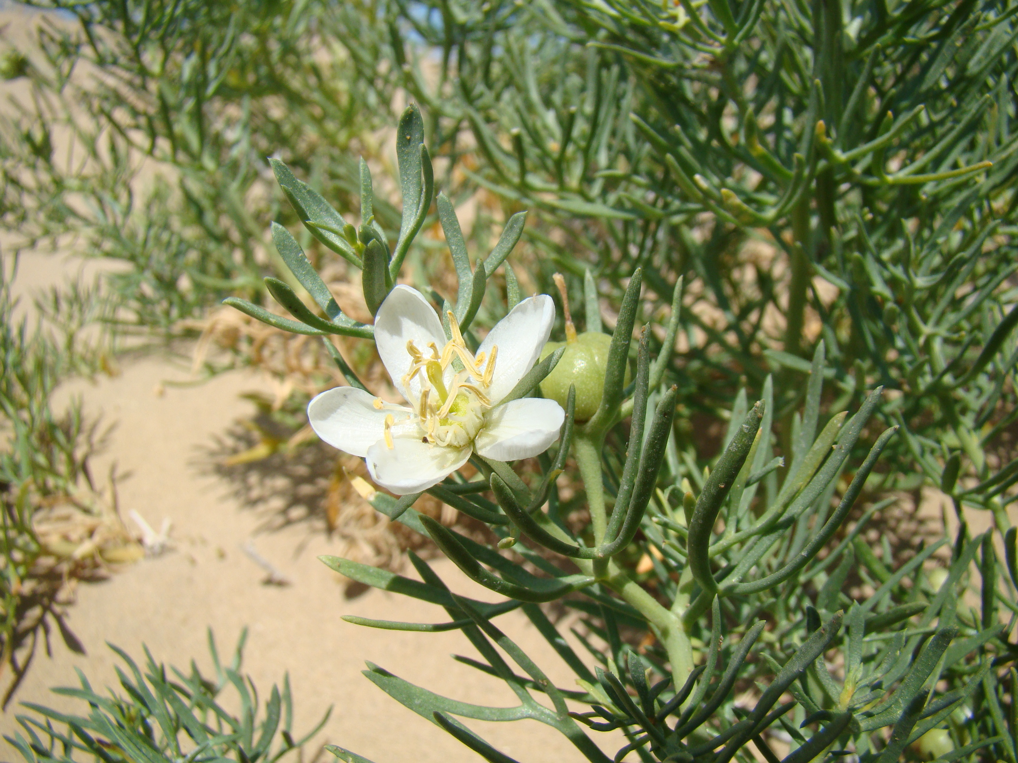 Гармала (Peganum harmala). Окрестости города Байконур, Казахстан